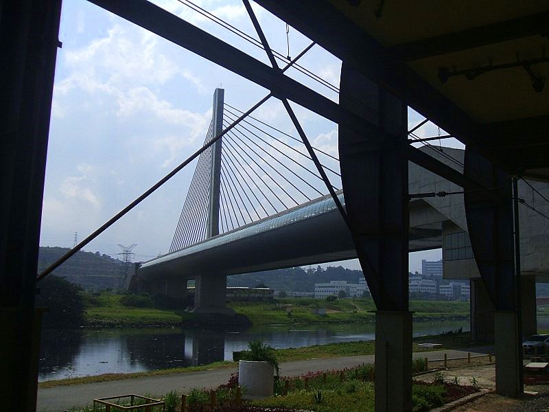 Estação Santo Amaro (CPTM-Metrô), em São Paulo, Brasil